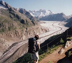 Aletsch Gletscher Glacier